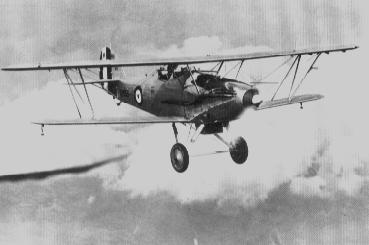 Hawker Demon Status: Lichtbild, Künstler unbekannt